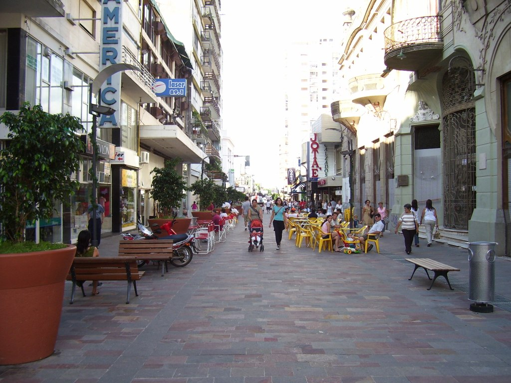 San Nicolás Street. Pergamino, Buenos Aires Province, Argentina.